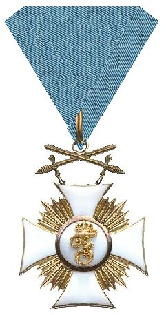 Ridderkruis aan oud lint